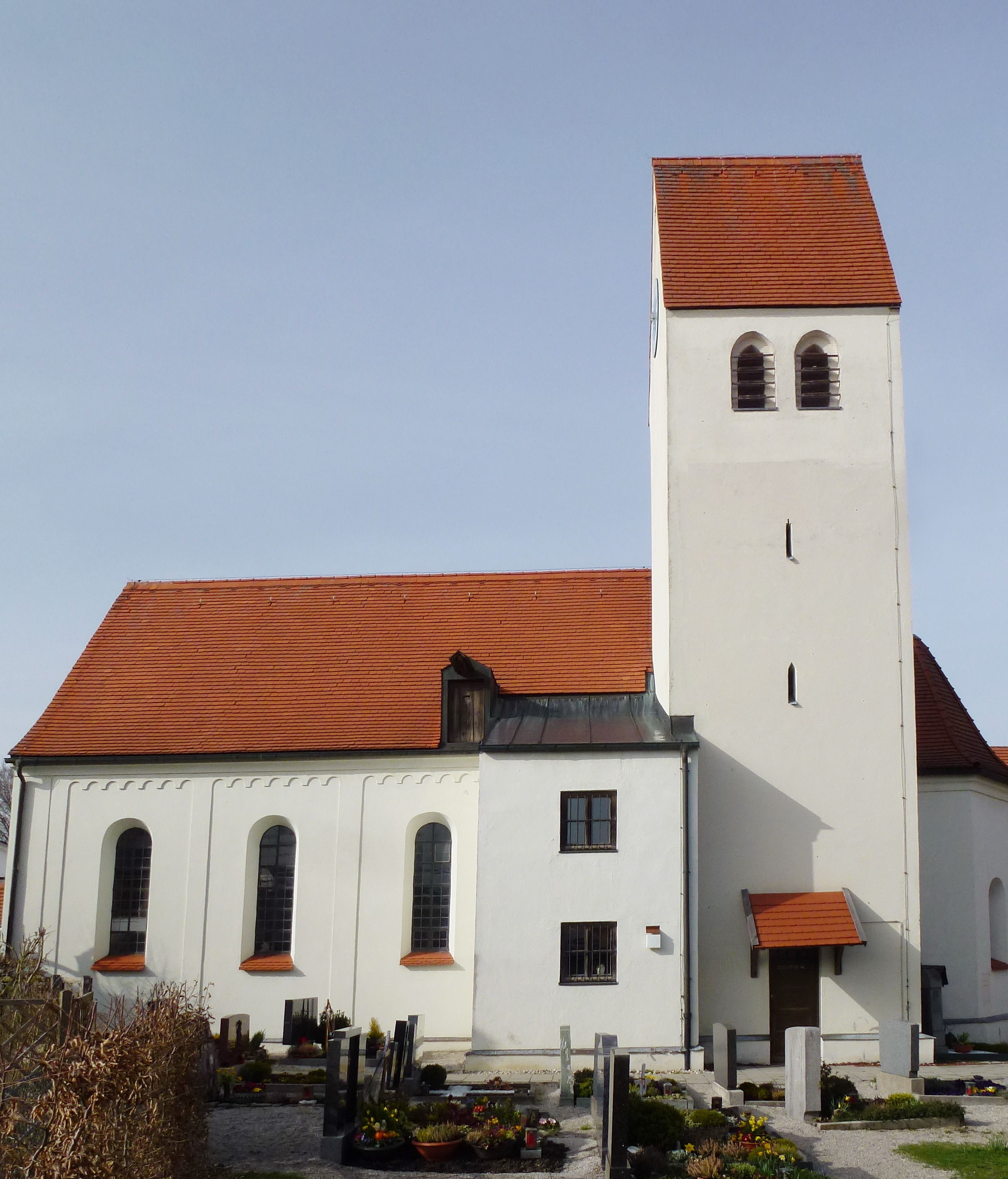 Alling-Biburg, Pfarrkirche_Mariä_Himmelfahrt. Ansicht von S